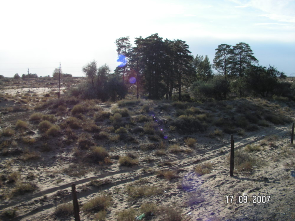 Пески Большие Барсуки. Сосновая рощица.